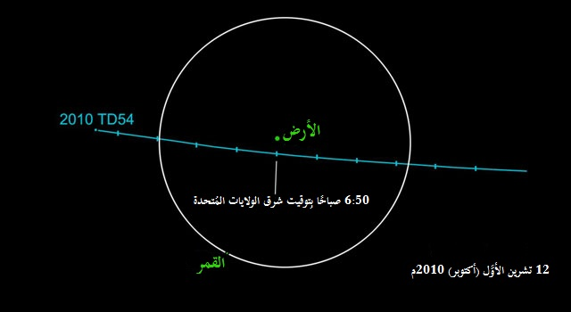 مسار الجُرم شبه الكوكبي 2010 TD54.